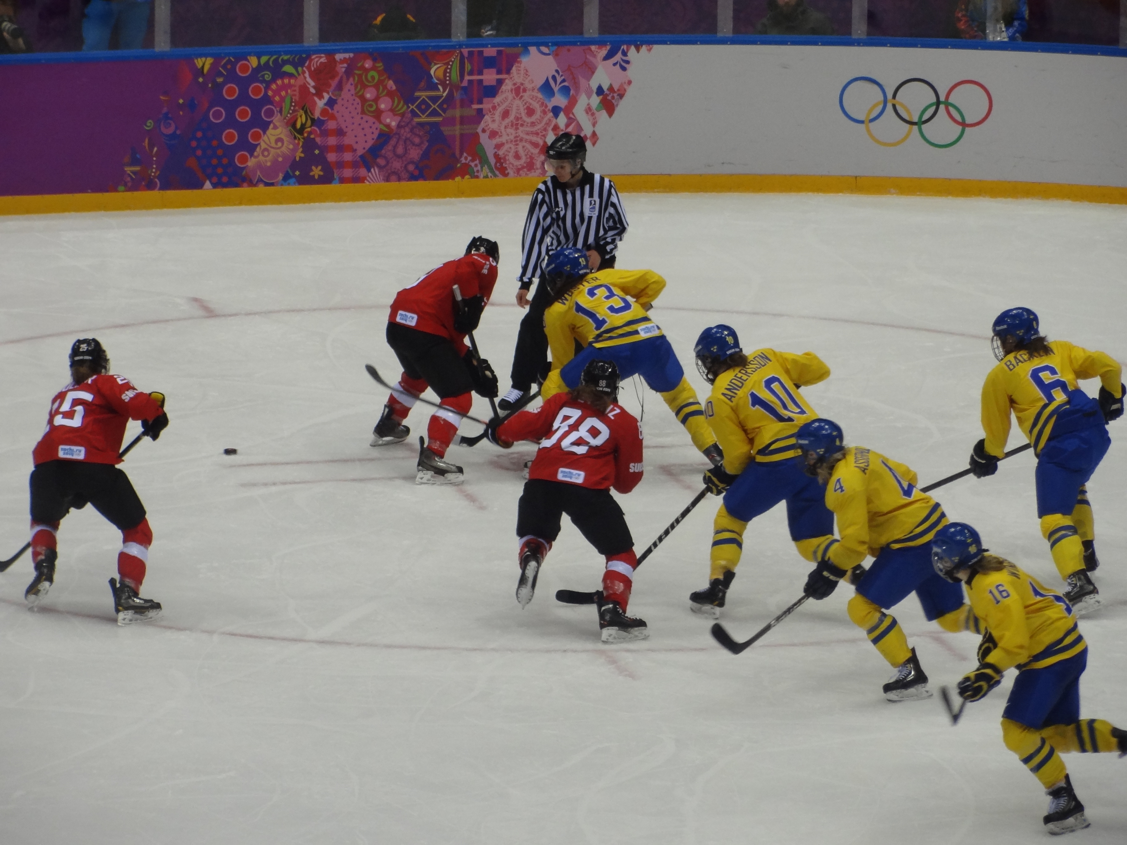 XXII Олимпийские зимние игры. Сочи, 20 февраля Хоккей. Женщины. За третье место. Швеция – Швейцария – 3:4 (1:0, 1:0, 1:4).